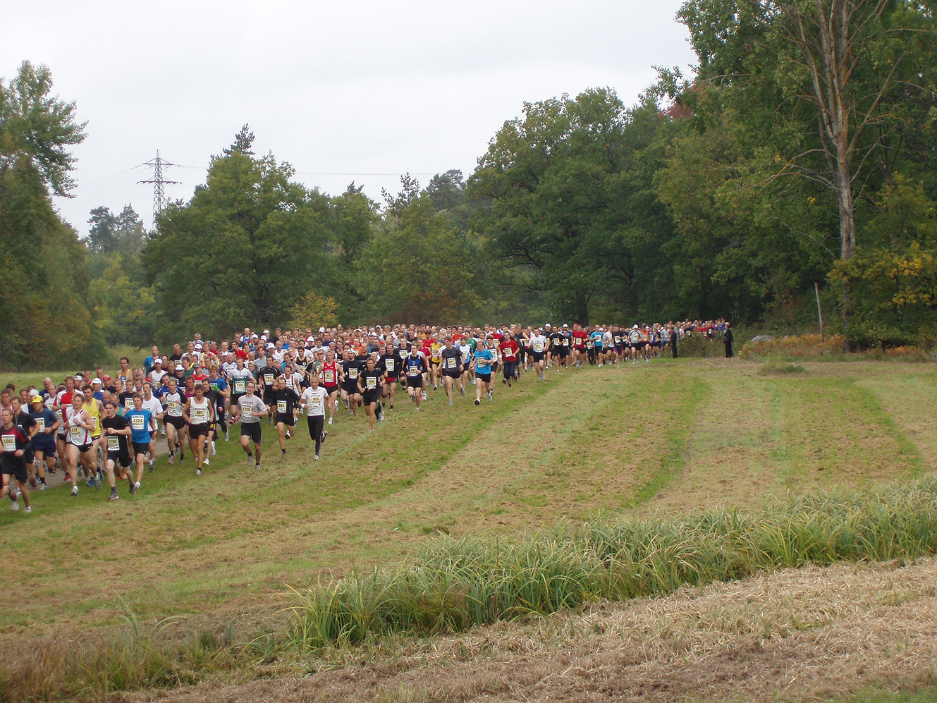 Lidingöloppet 27 september 2008. Huvudklungan med elitlöparna i grupp 1A,B och C någon minut efter start kl. 12:30 från Koltorps gärde.